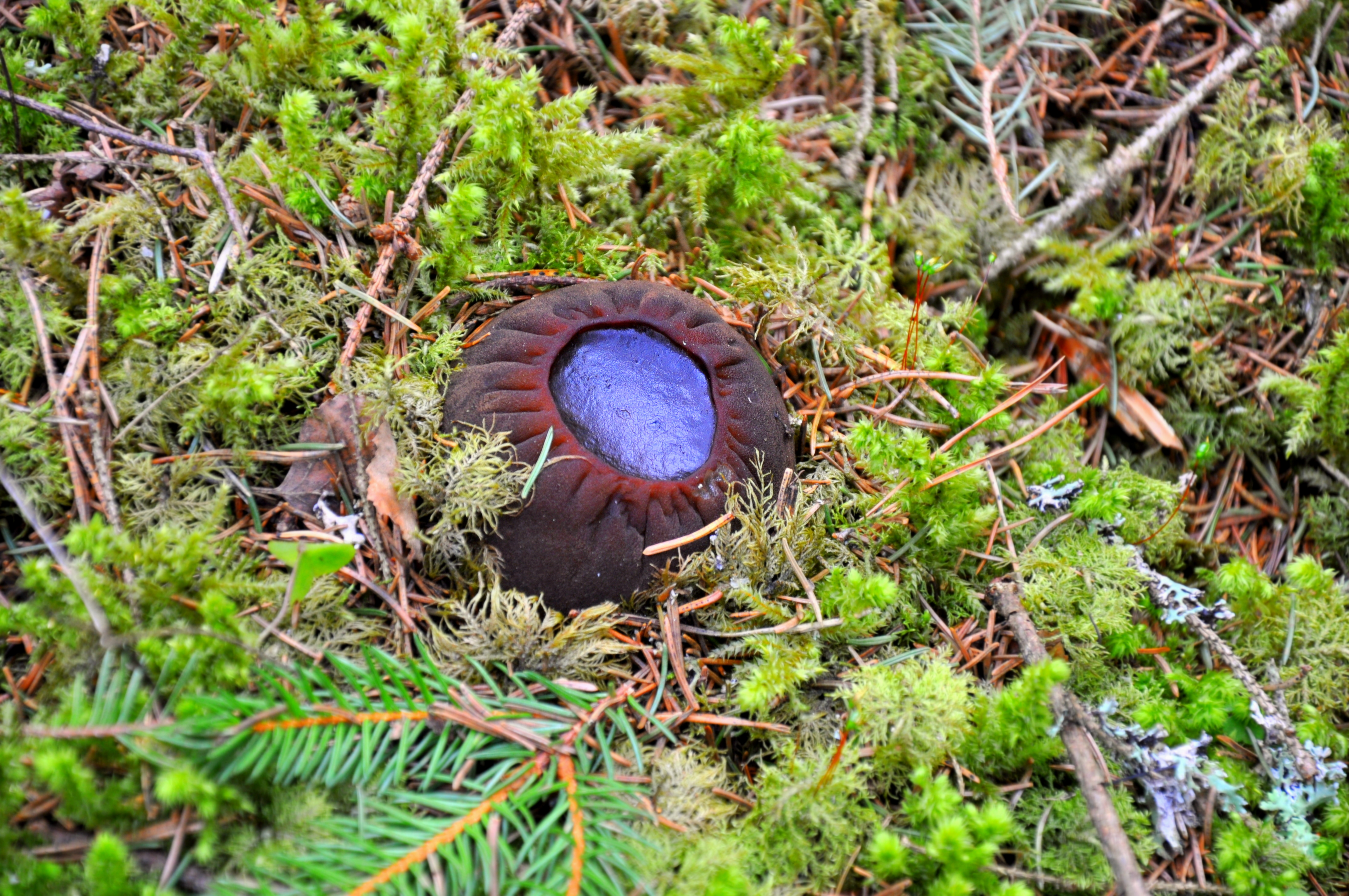 Haruldane seen